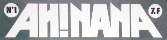 Titre du magazine "Ah! Nana" numéro 1.